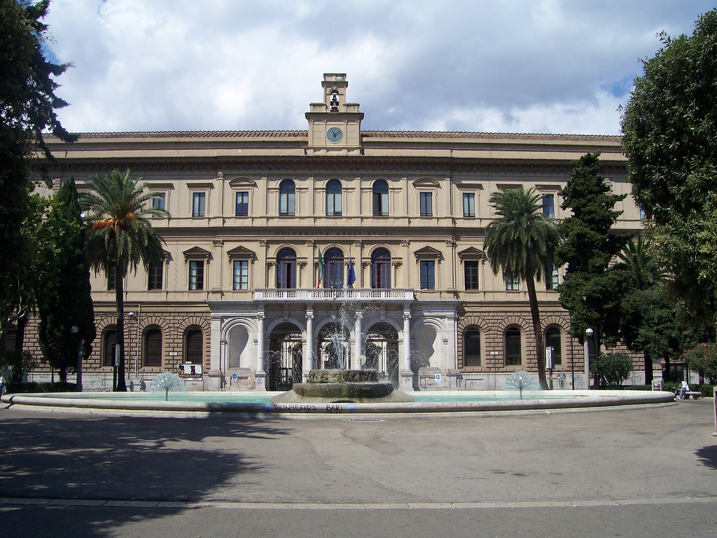 Bari Ülikooli peahoone.